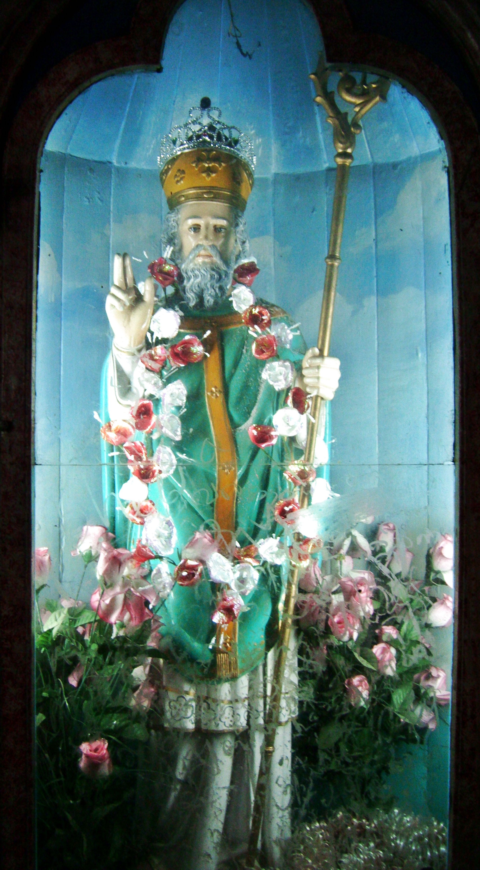 St. Patrick von Irland, Figur in Kanjiracode, Kollam District, Kerala, Indien